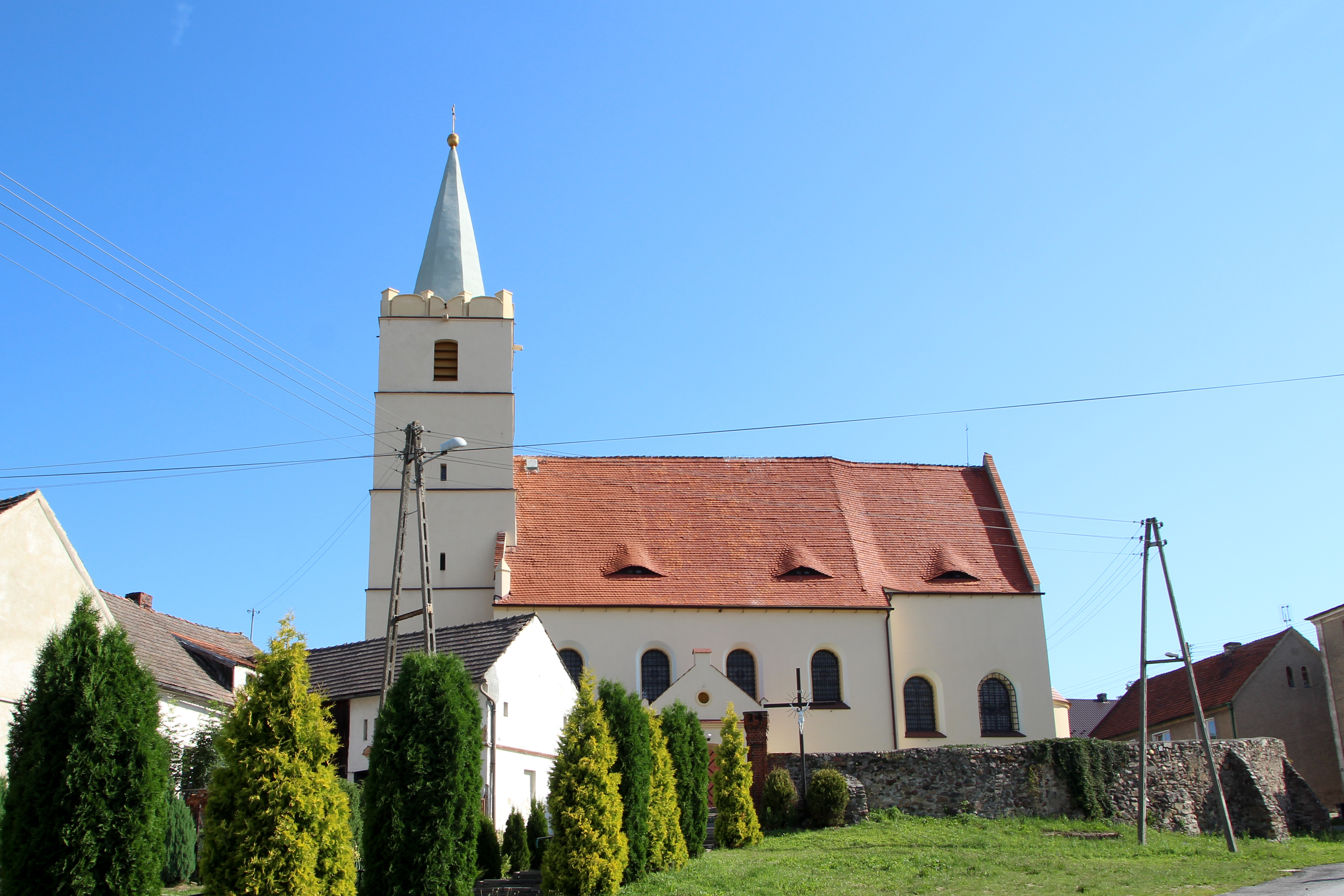 Wierzbięcice - wieś w Polsce w opolskim, w powiecie nyskim, w gminie Nysa.